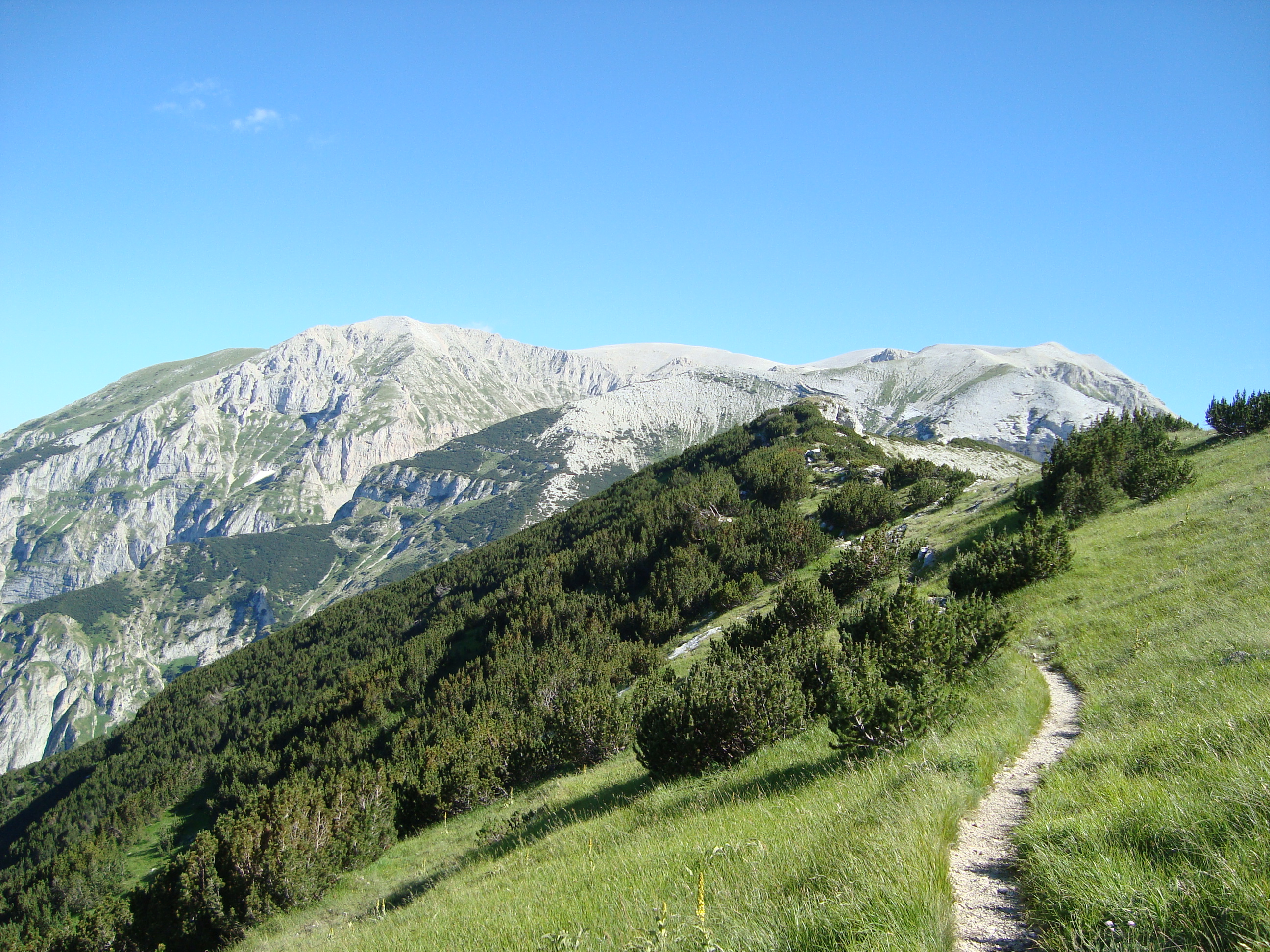 Majella National Park, view to C. Delle Murelle and M. Acquaviva